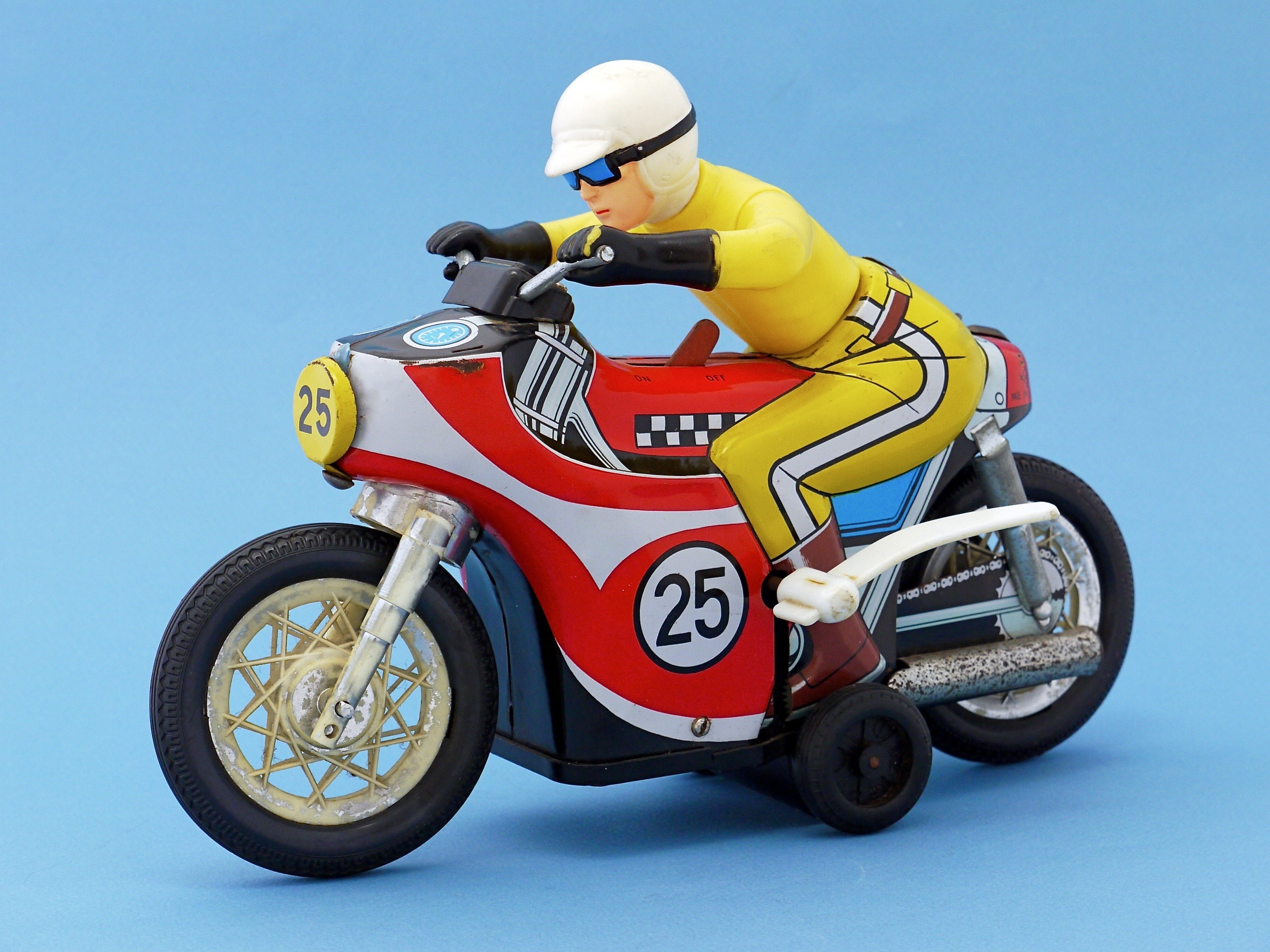 Daiya, Japan 1970